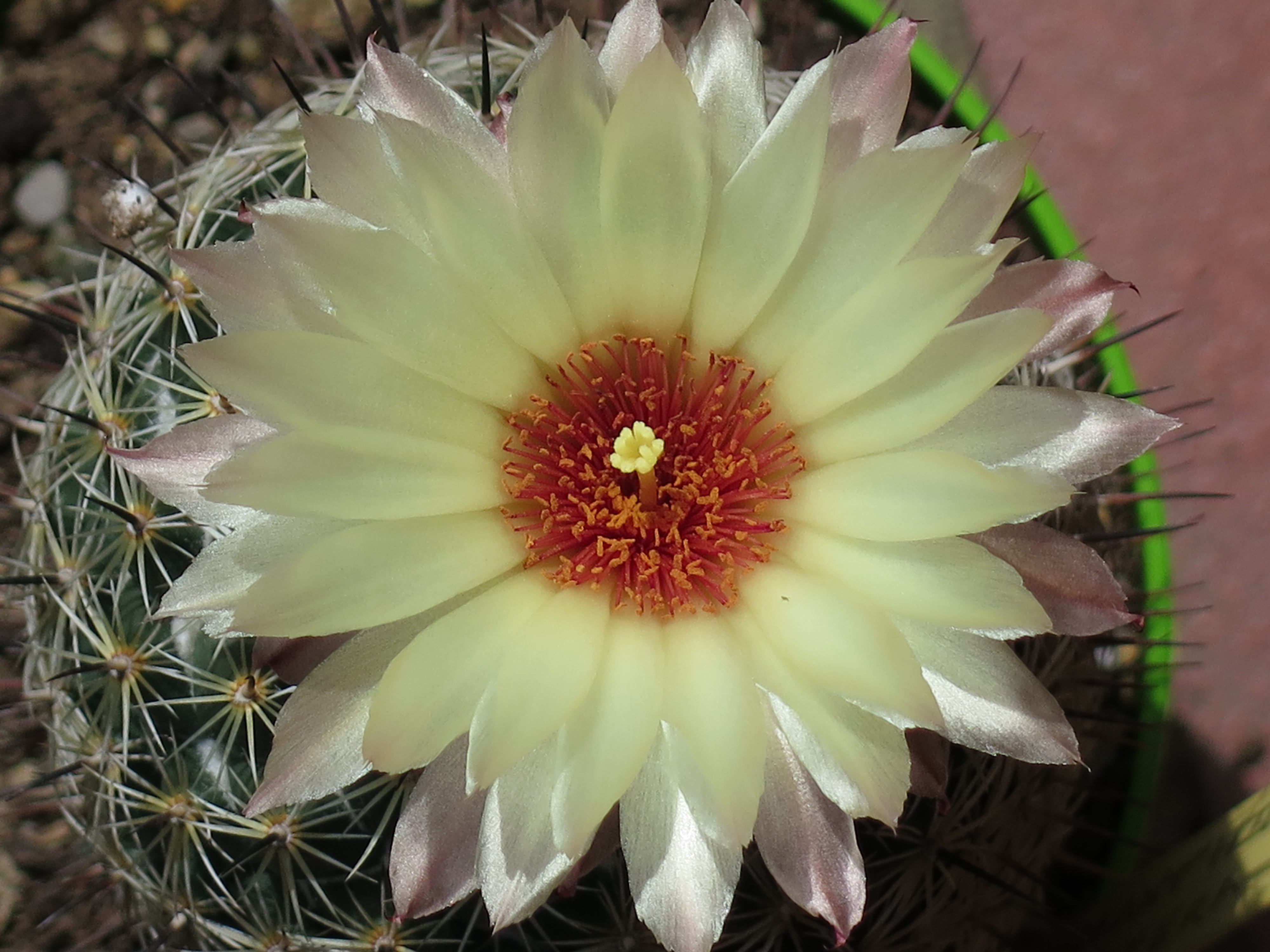 Il fiore della coryphantha cornifera. Si distinguono il pistillo centrale, gli stami, le antere con il polline e la corolla